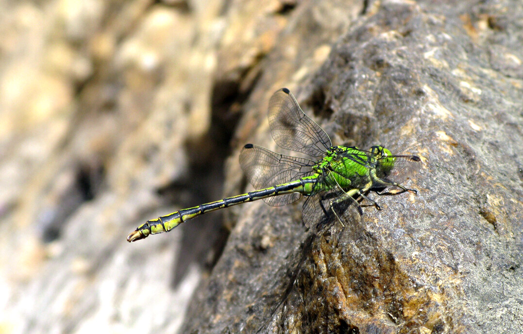 棘角蛇纹春蜓（Ophiogomphus spinicorne），中国国家二级保护动物，松山保护区是其在全国最主要的栖息地。（图片摄于松山国家级自然保护区，拍摄者：计云）